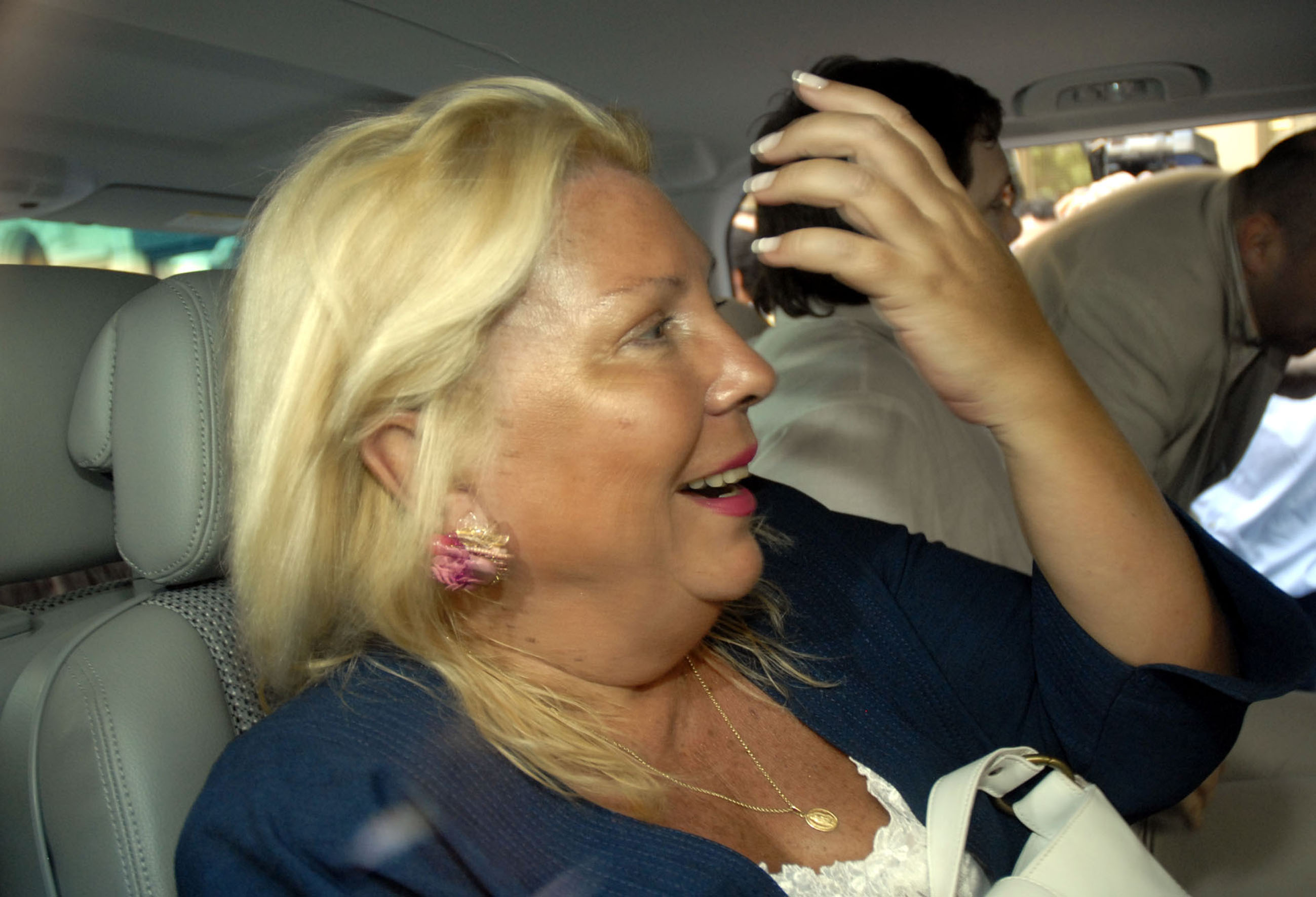 Após votar, a candidata Elisa Carrió deixa o local protegida por policiais